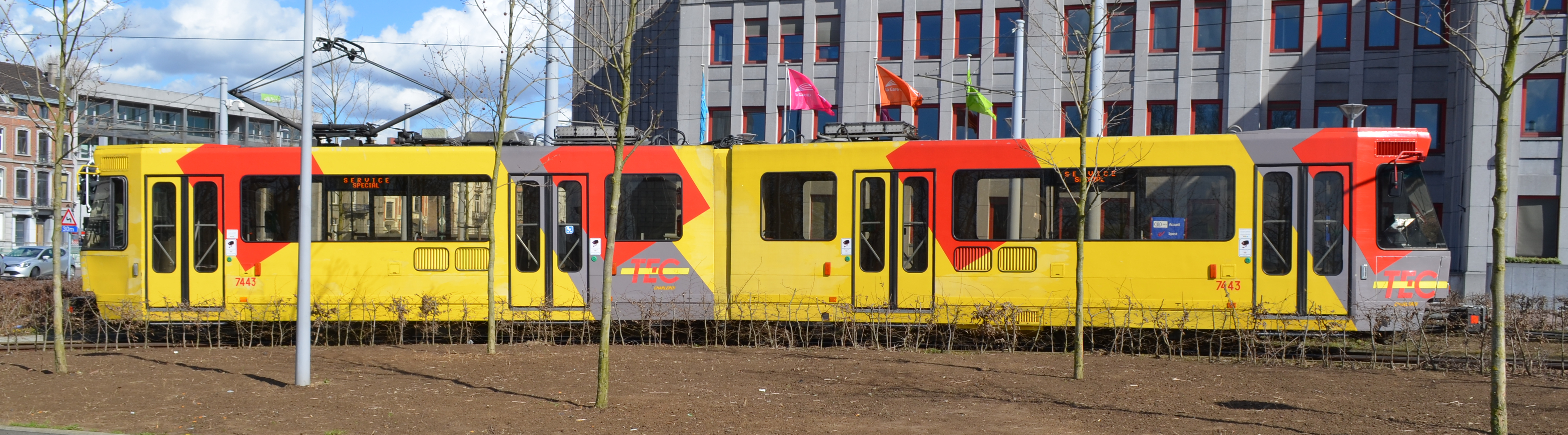 Métro léger de Charleroi - véhicule 7443 dans la boucle de retournement de la station Sud. Image tronquée.